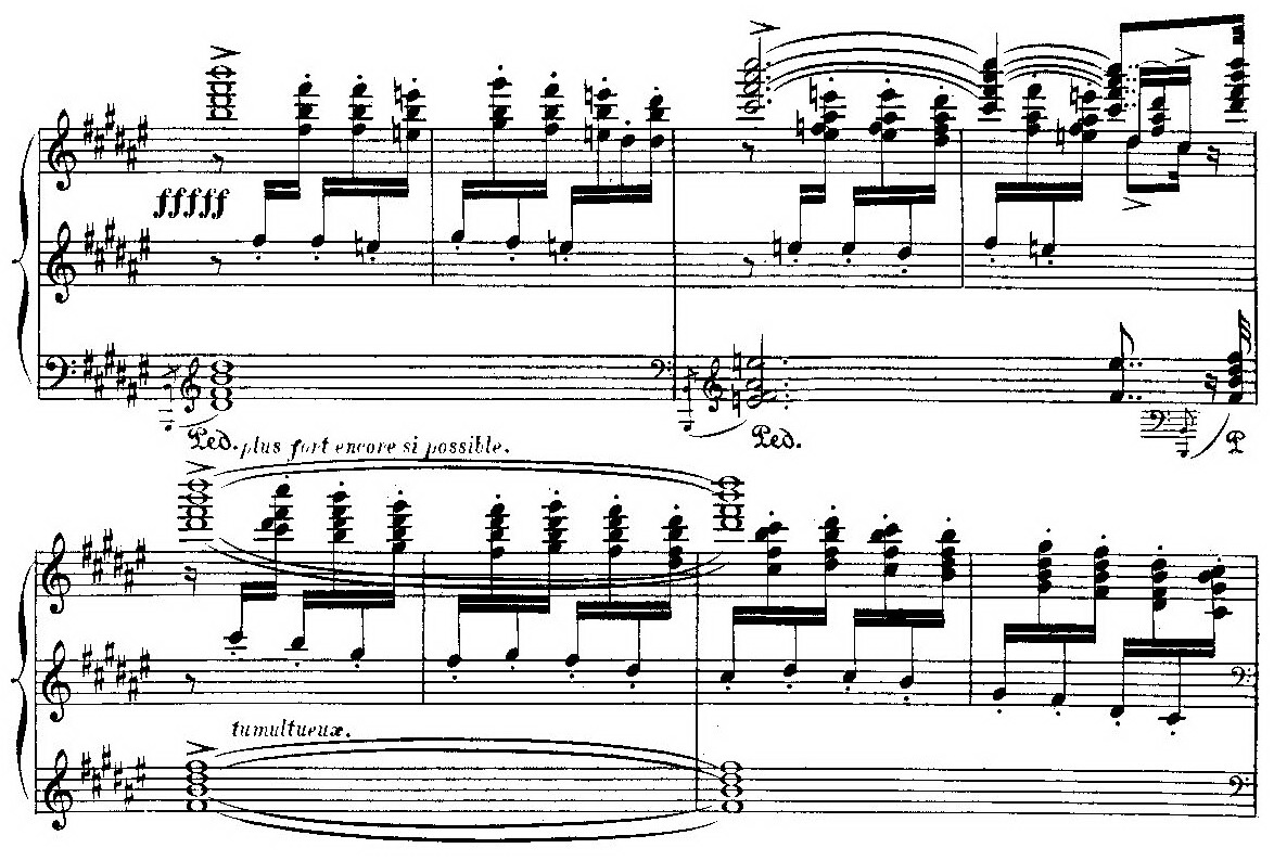 Partitura de El Corpus Christi en Sevilla